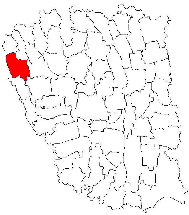 Categorie:Hărţi ale judeţului Galaţi